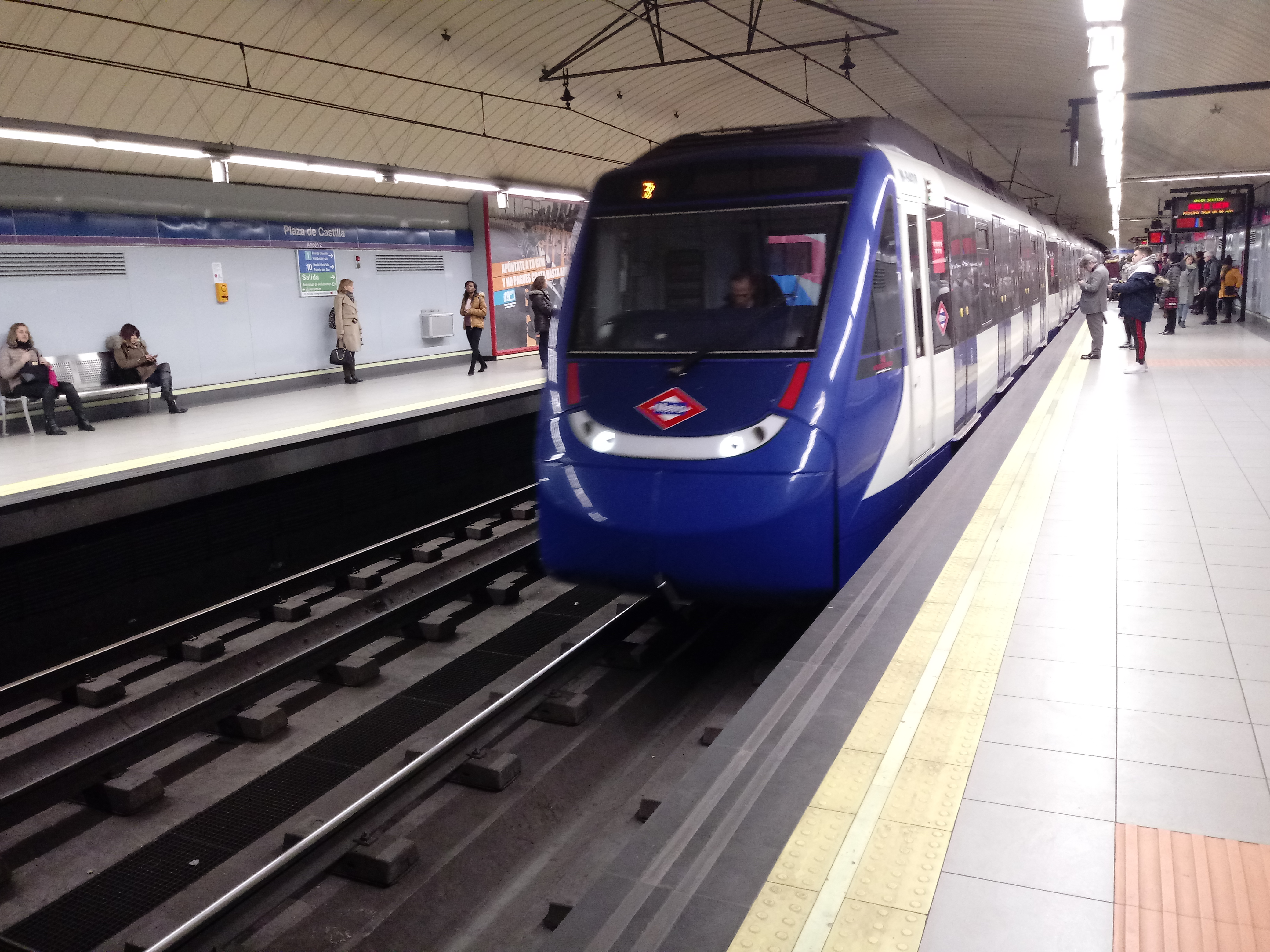 Tren de la serie 9000 en Plaza de Castilla, L9